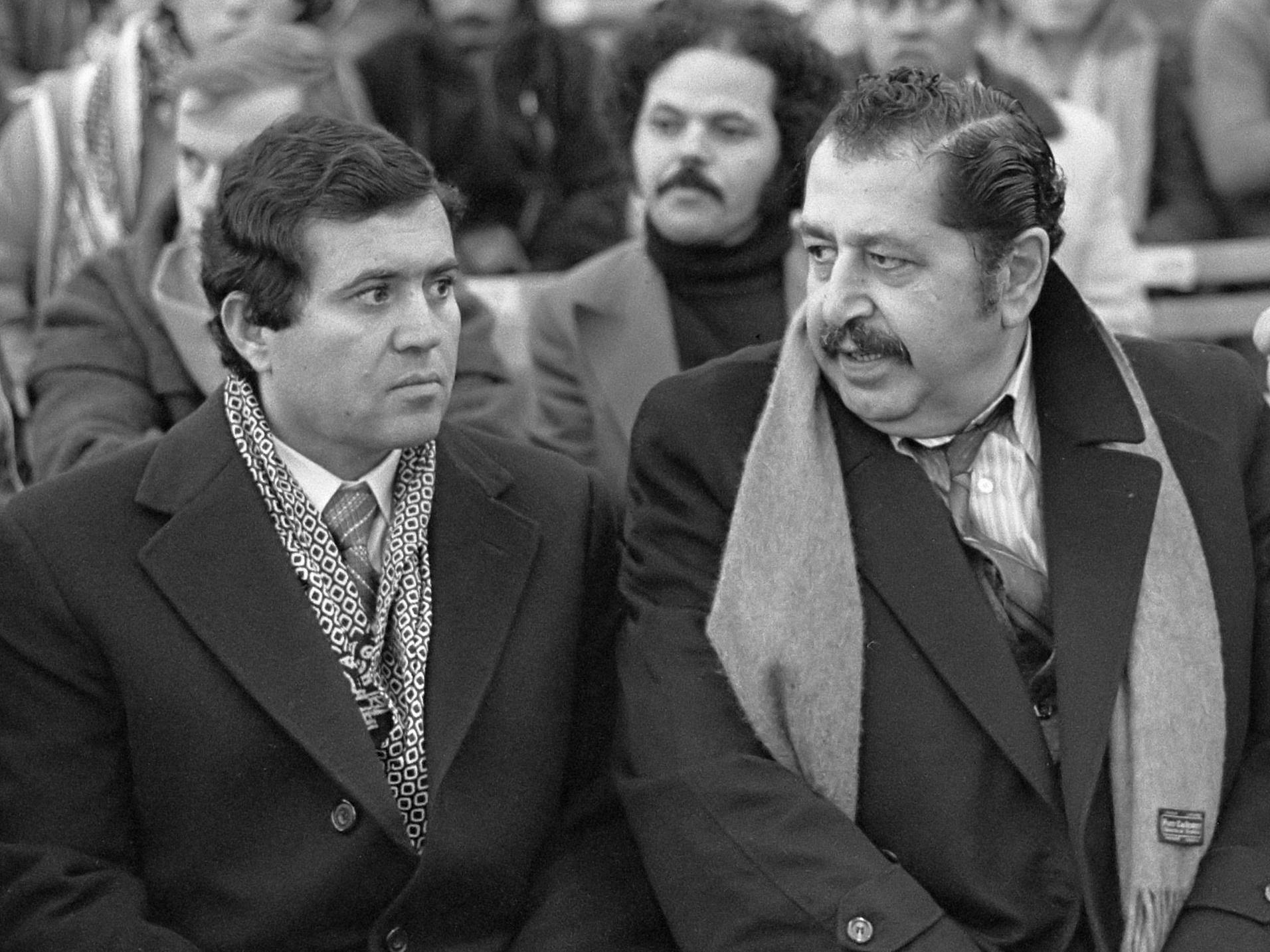 Manifestatie in Utrecht voor solidariteit met de Palestijnen, Honorair consul van Saoudi-Arabië Rabbani (uiterst links) met PLO-topman Khaled al Hassan 29 november 1980